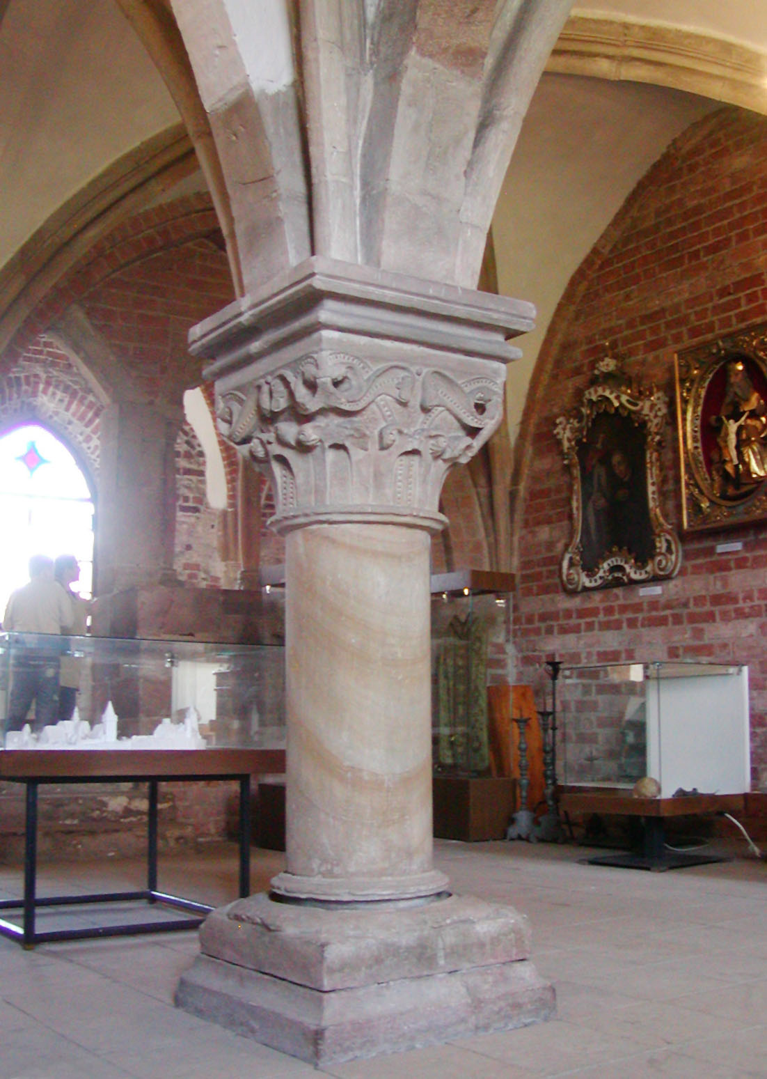 Sulejów Monastery Romańska kolumna podpierająca sklepienie kapitularza